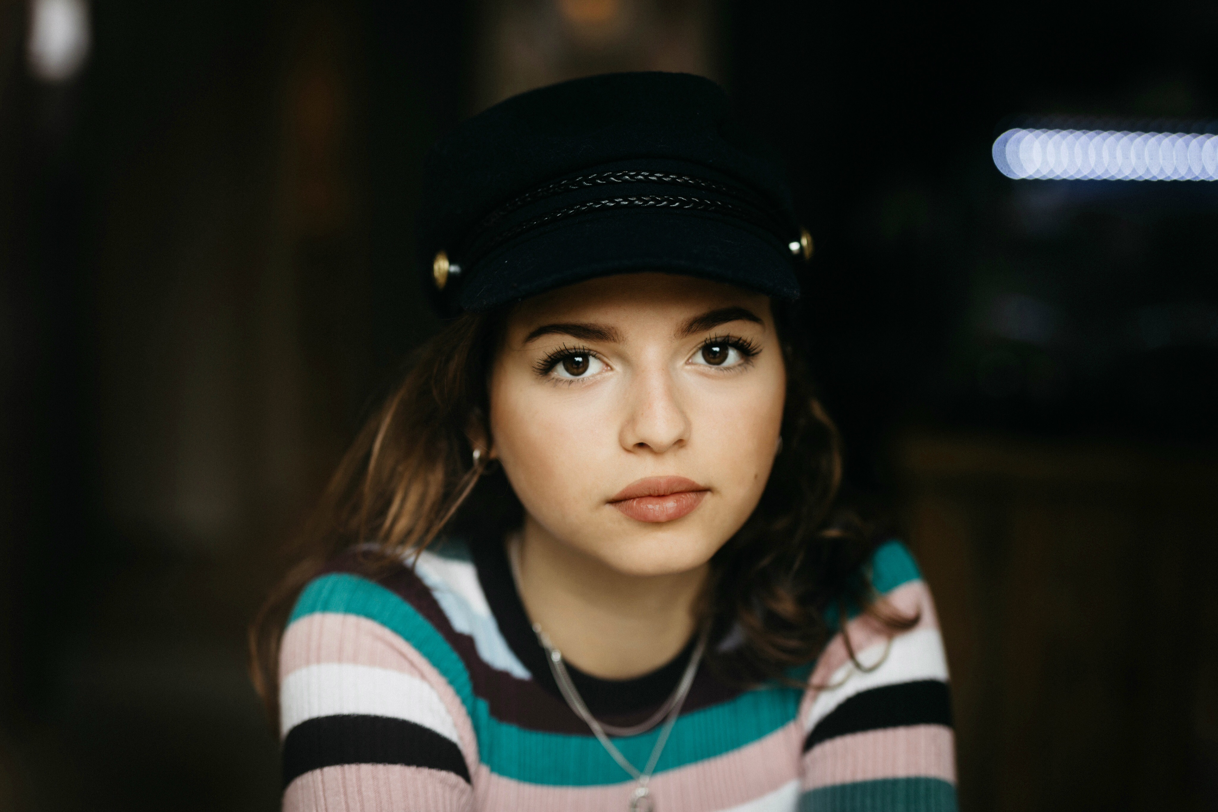 Nina Kaiser, 2017